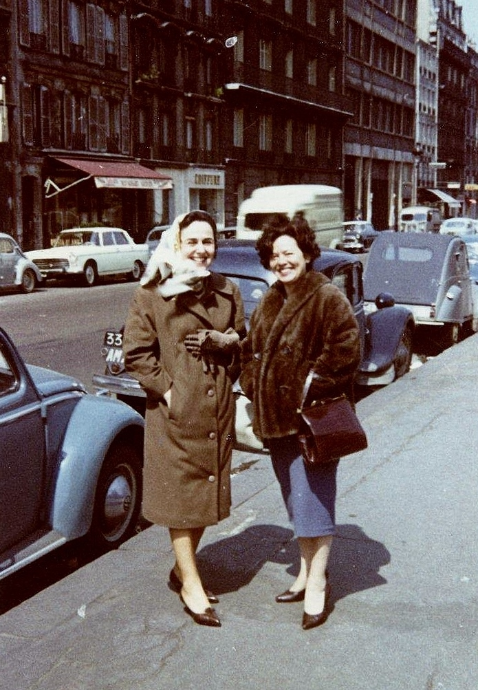 Anne-Lise Stern au foulard et sa cousine Suzy. Paris, vers 1960.